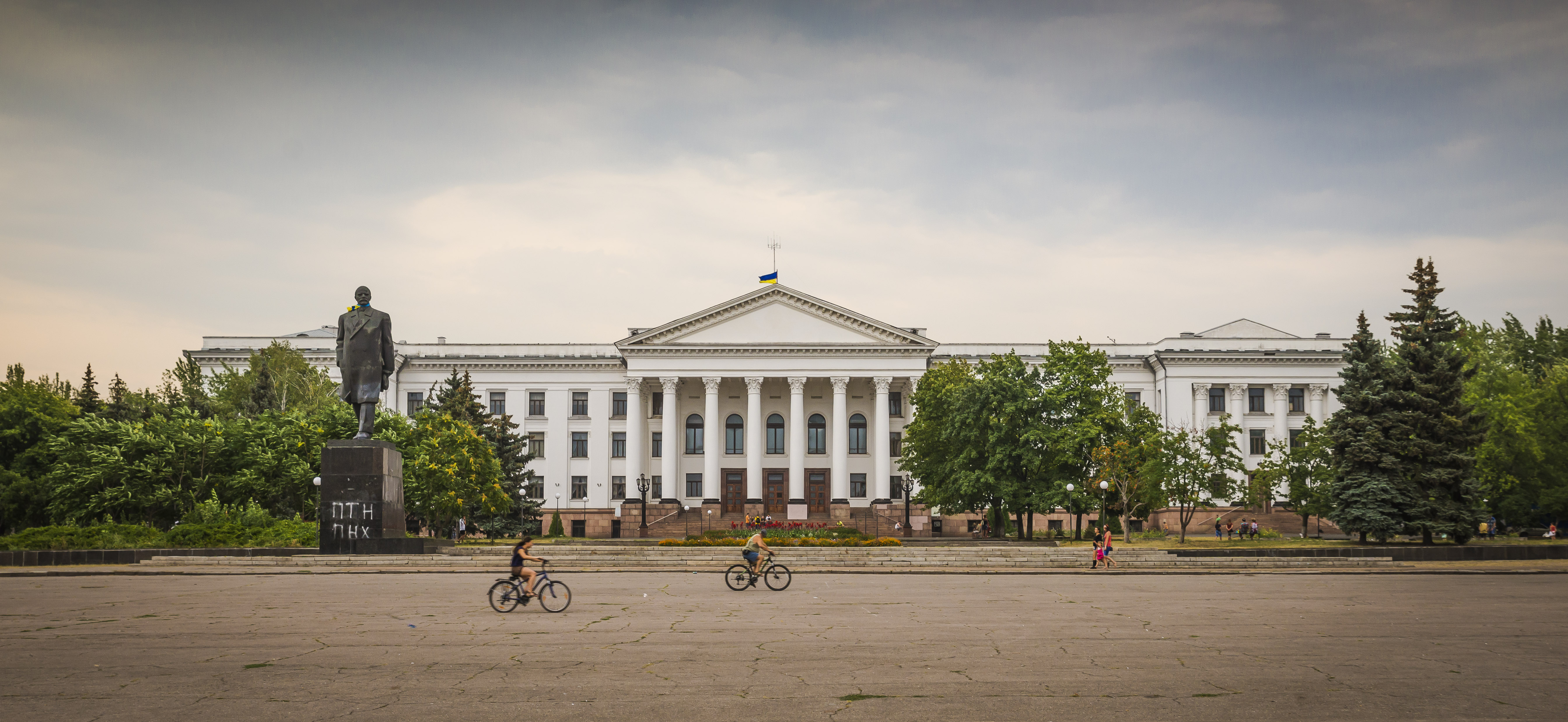 Палац культури і техніки Новокраматорського машинобудівного заводу, Краматорськ, пр. Леніна, 1